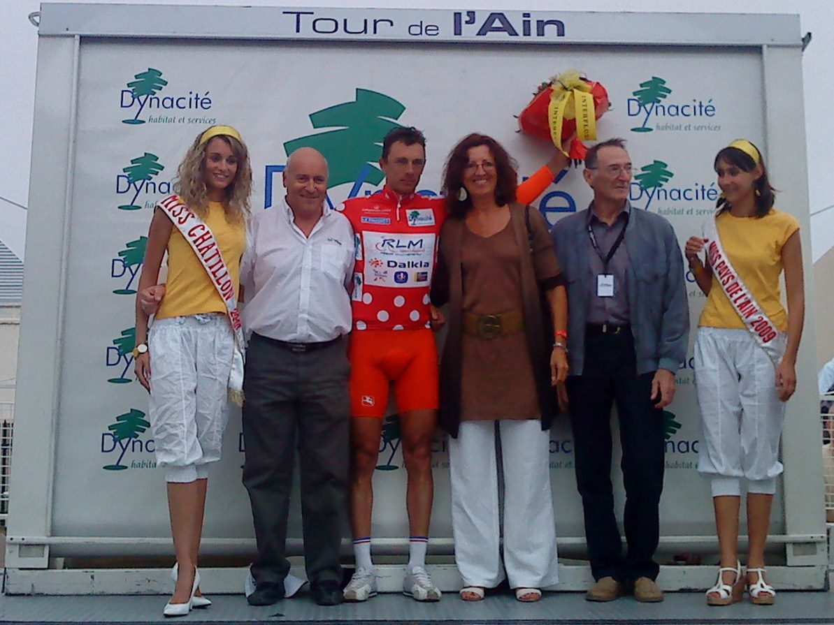 Classement final du Tour de l'Ain 2010 : maillot à pois remporté par Benoît Daeninck.